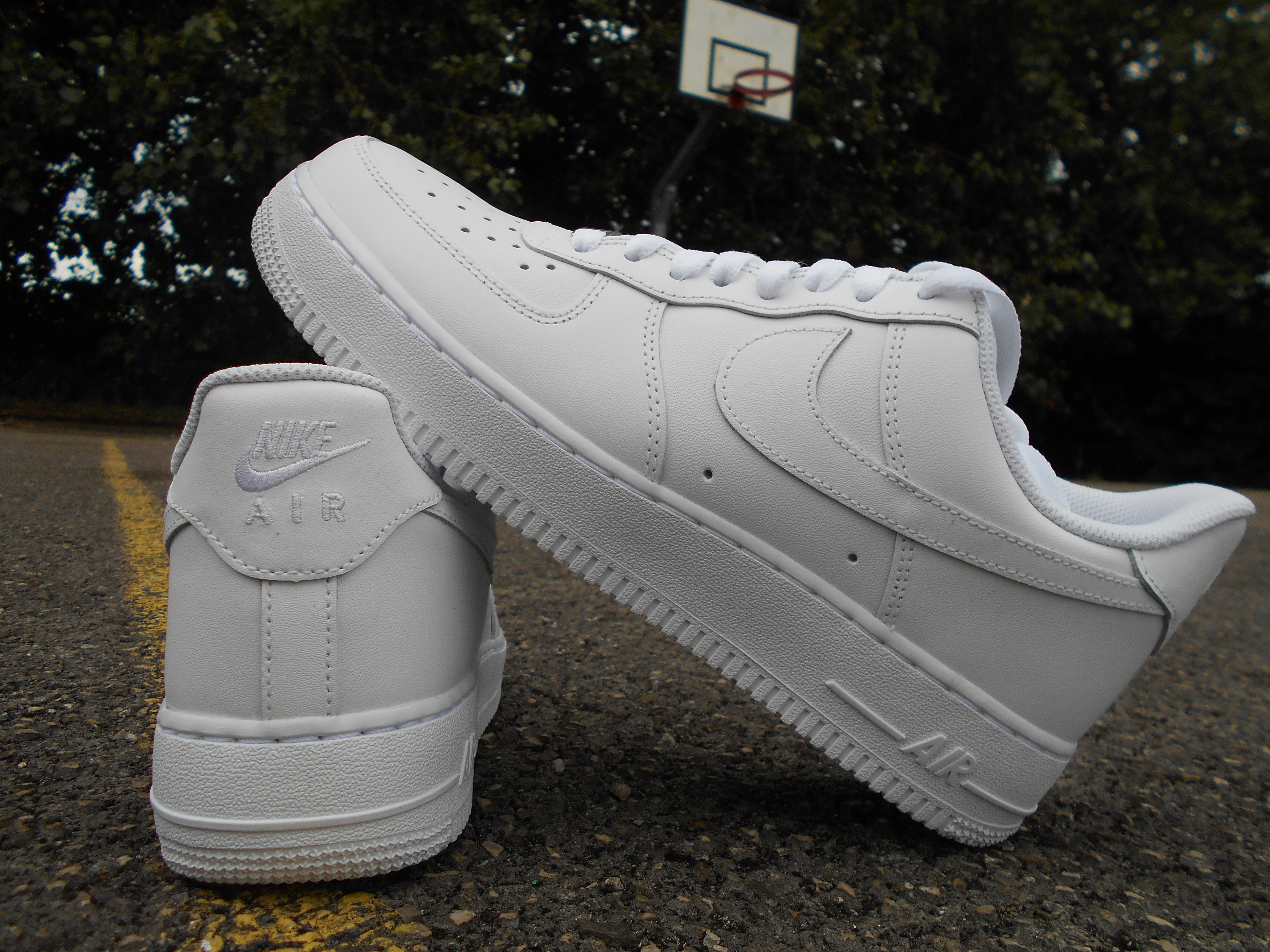 Nike air Force 1 white on white est la modèle le plus vendu.